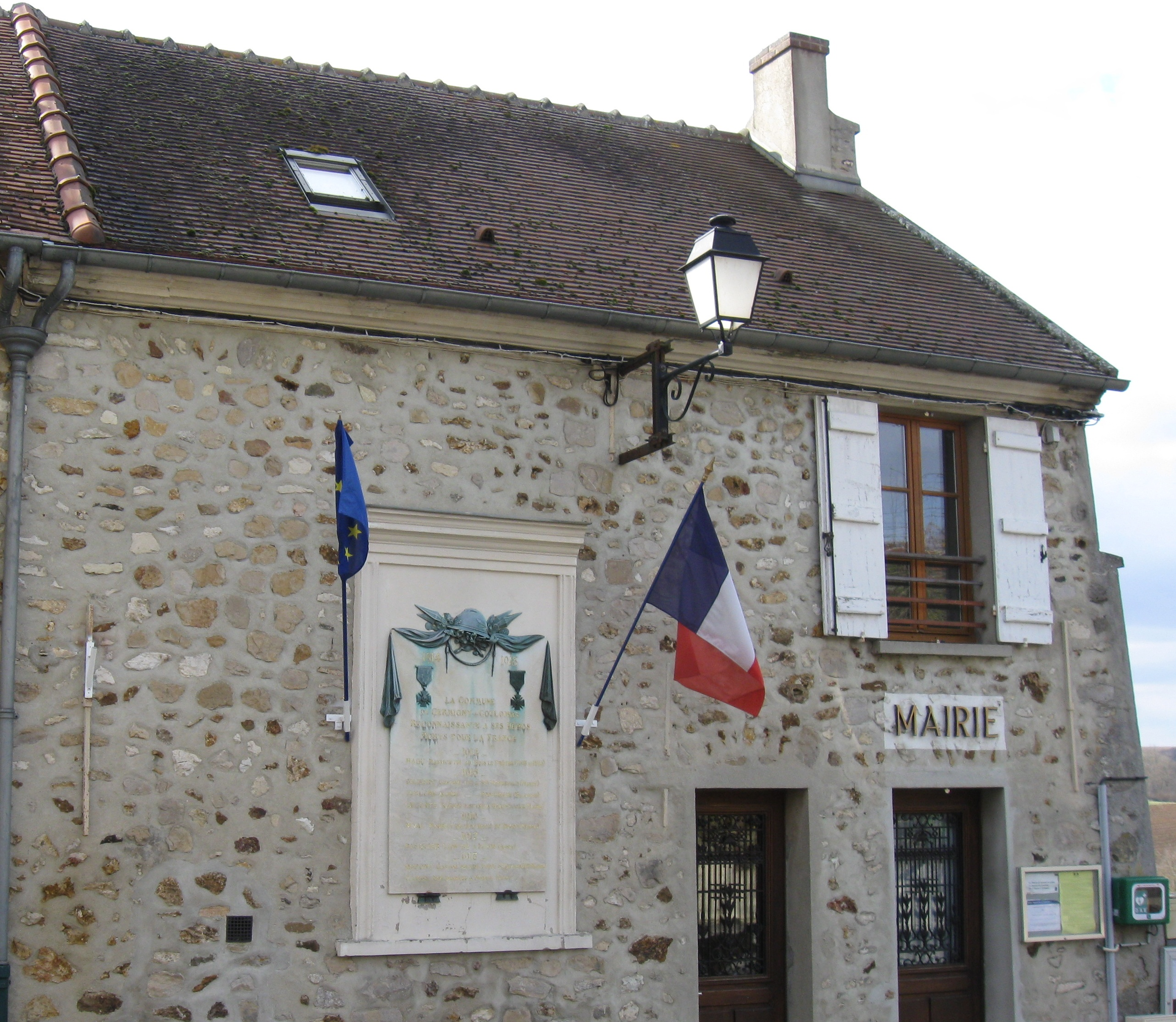 Mairie de Germigny-sous-Coulombs. (Seine-et-Marne, région Île-de-France).